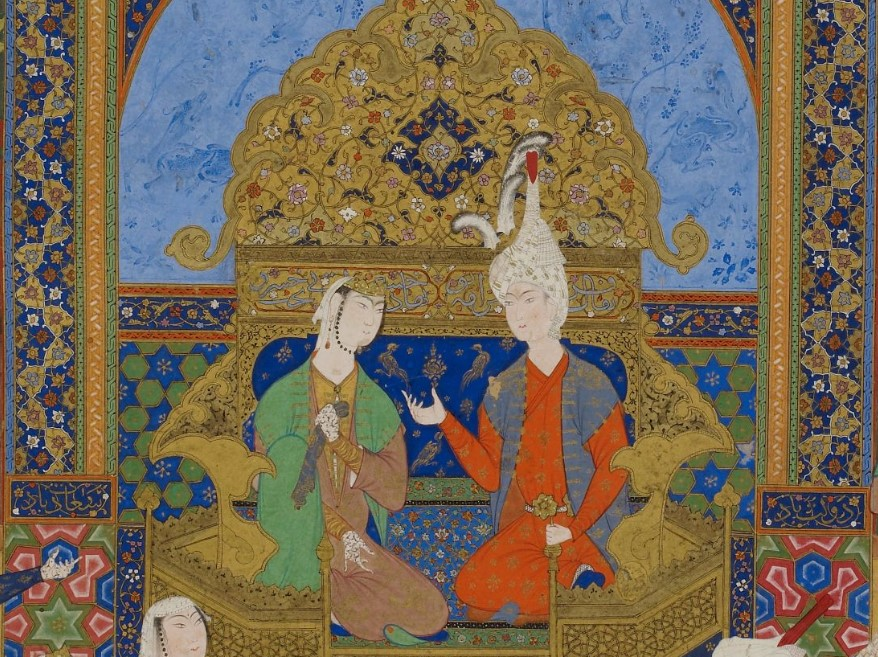 Ağa Mirək - Xosrov və Şirinin qızların nağıllarını dinləmələri detal